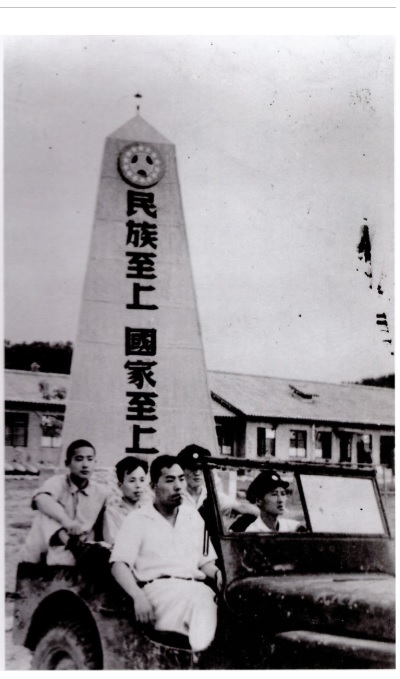 수원에 있었던 조선민족청년단 중앙훈련소에서 촬영된 사진이다. 조선민족청년단의 슬로건인 '민족지상 국가지상'이라 쓰인 탑을 배경으로 지프차를 타고 있는 5명의 모습을 담고 있다.